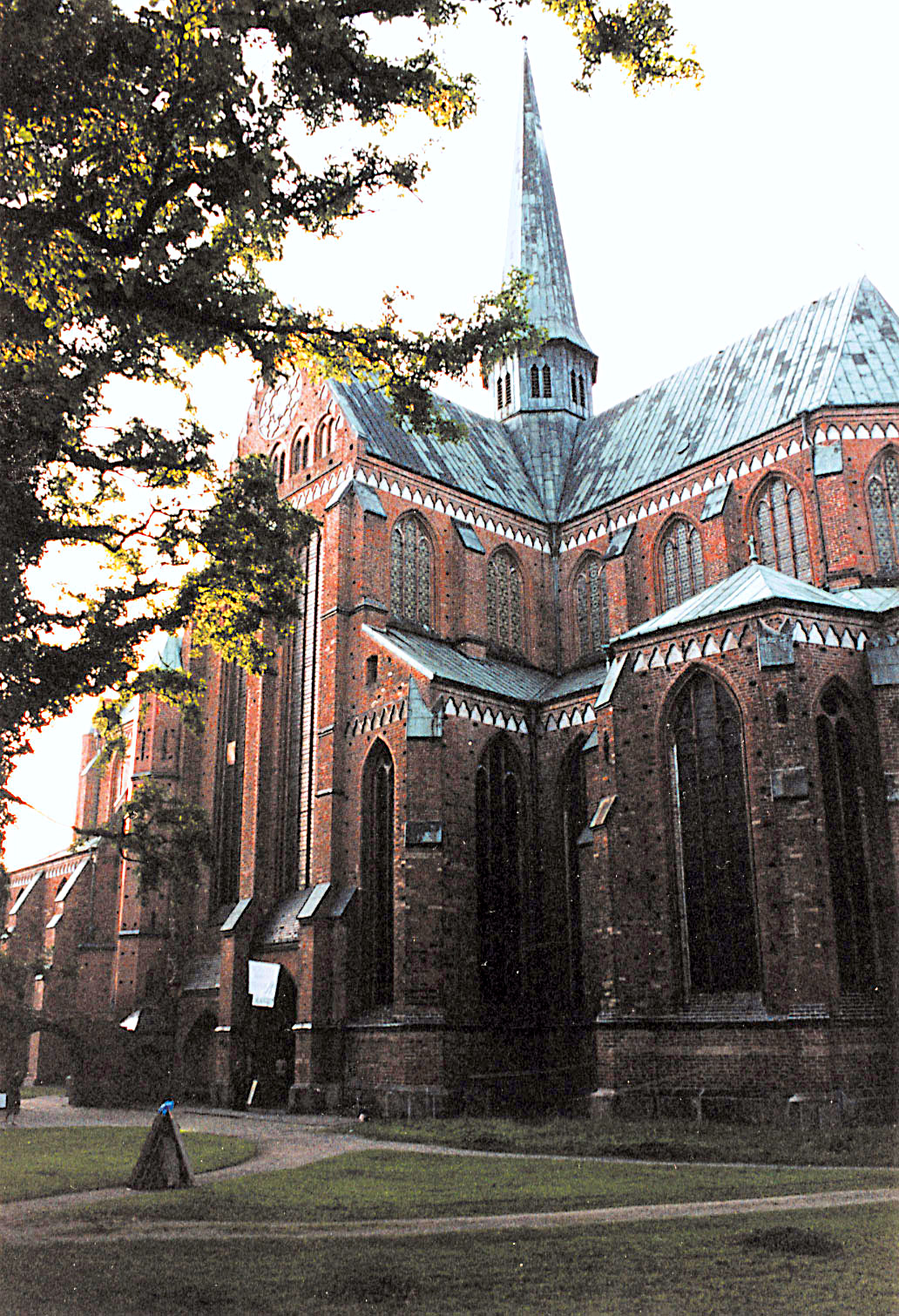 Münster in Bad Doberan